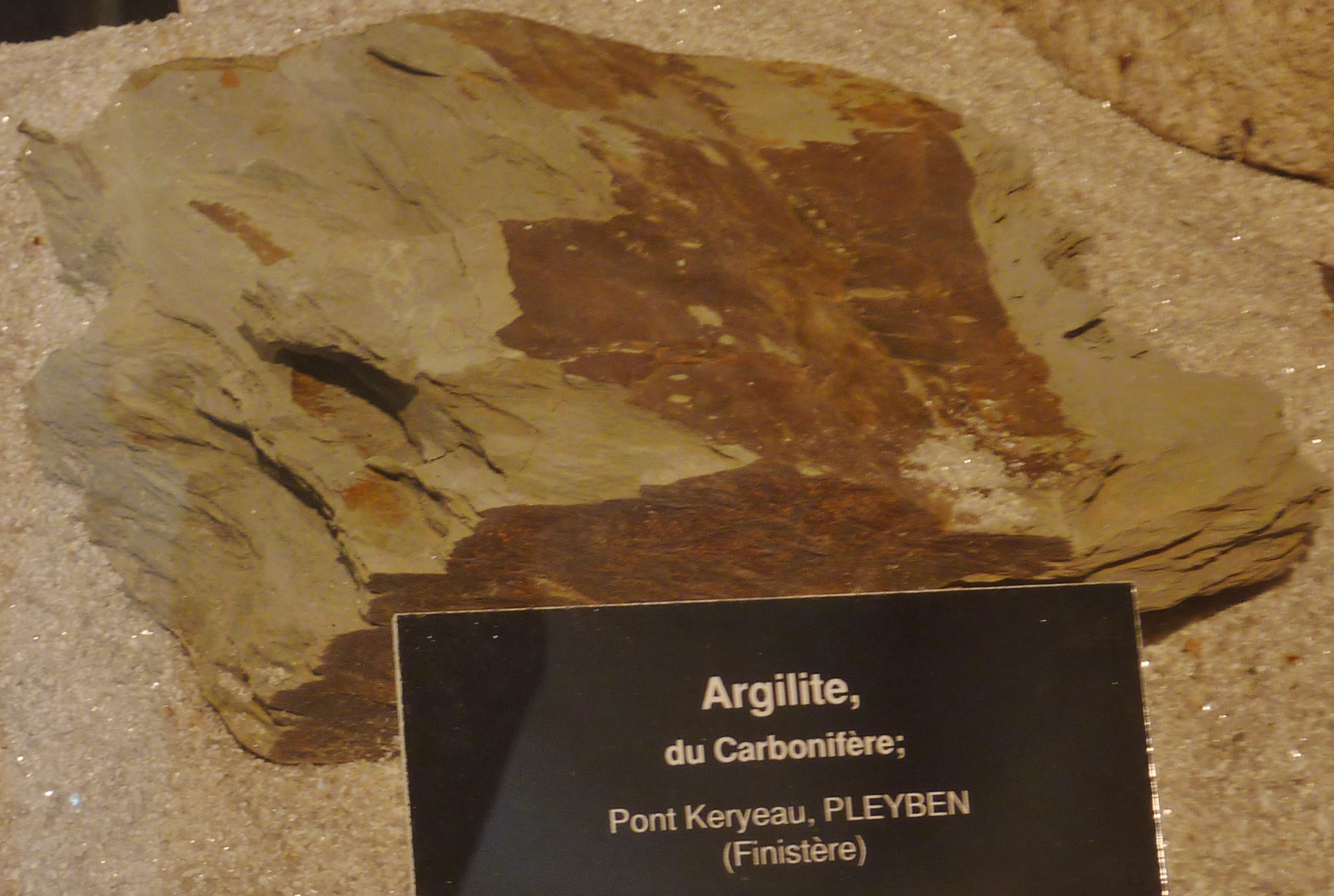 Argilite du carbonifère trouvée à Pont-Keryau en Pleyben (29) (Tropical Parc de Saint-Jacut-les-Pins)